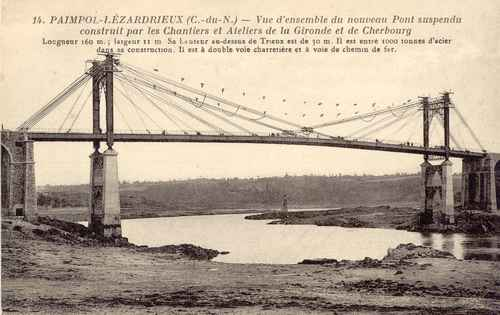 Le pont de Lézardrieux modifié pour le passage de la ligne des Chemins de Fer des Côtes-du-Nord. La structure à droite dans l'image subsite aujourd'hui.